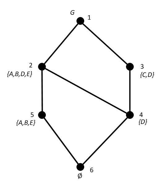 tralie voor voorbeeld bij "Formal concept analysis"